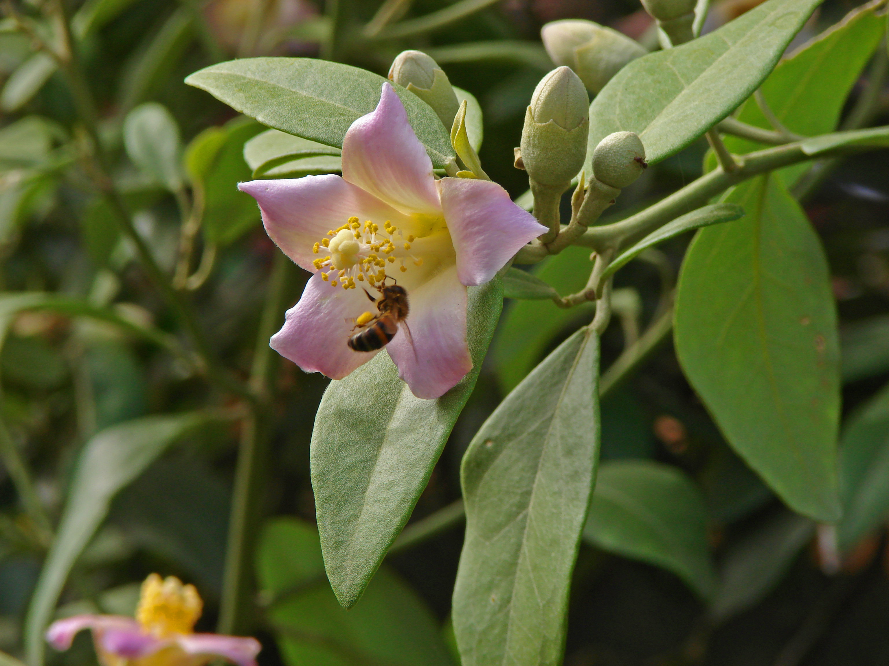 Blüte